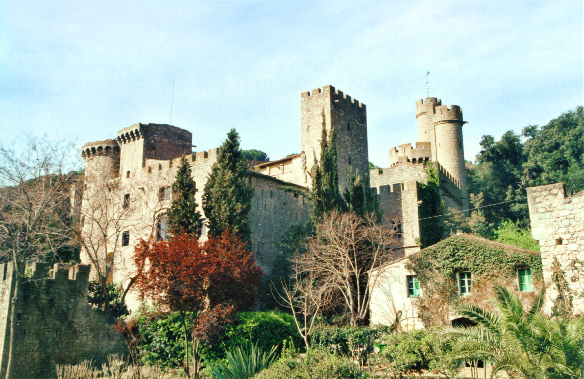 Castell de Santa Florentina, a Canet de Mar